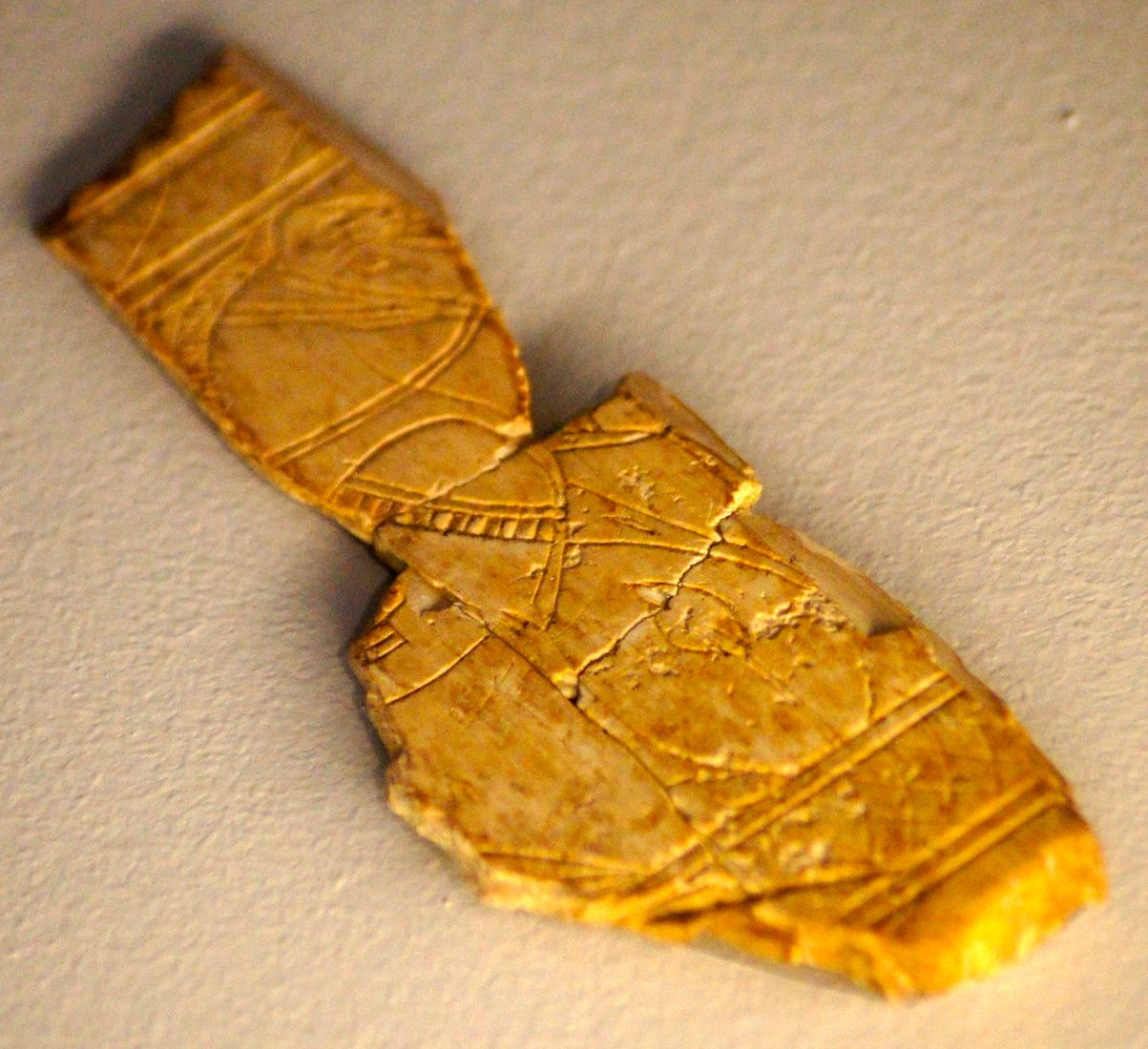 Peine de marfil hallado en el Llanete de los Moros de Montoro. Bronce Final